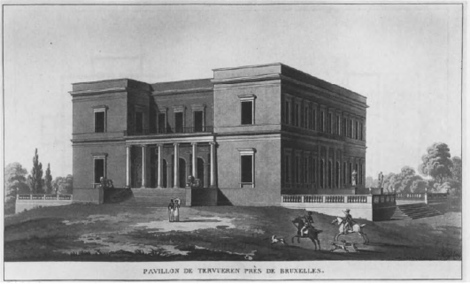 Jachtpaviljoen van de prins van Oranje in Tervuren (gebouwd 1817-1822, afgebrand 1879)